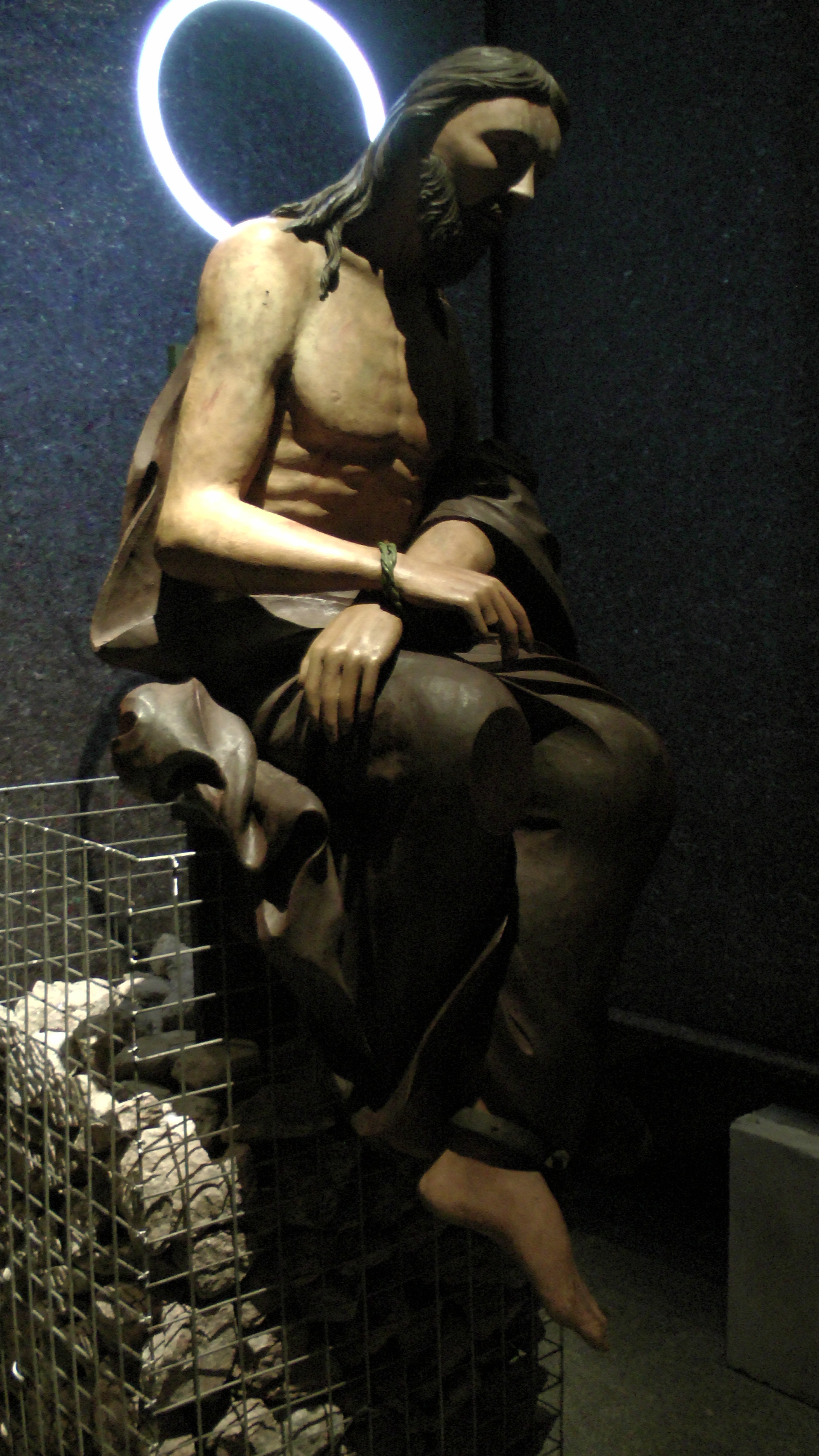 Спас Полунощный (Христос в темнице). Русский музей, XVIII век. Резьба, дерево, роспись